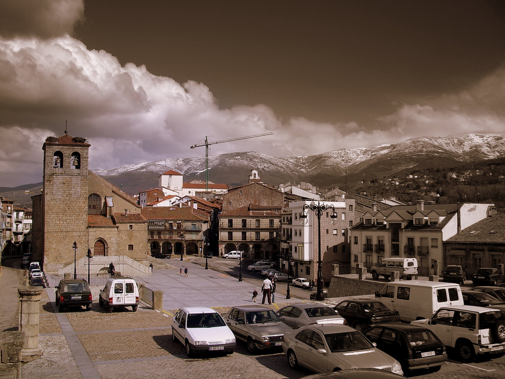 Plaza Mayor de Béjar, y a la izquierda de la imagen aparece la fachada principal y la torre de la iglesia de El Salvador de Béjar, provincia de Salamanca, (España).